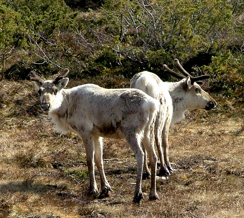 To reinar, ved gloppen ungdomskule.